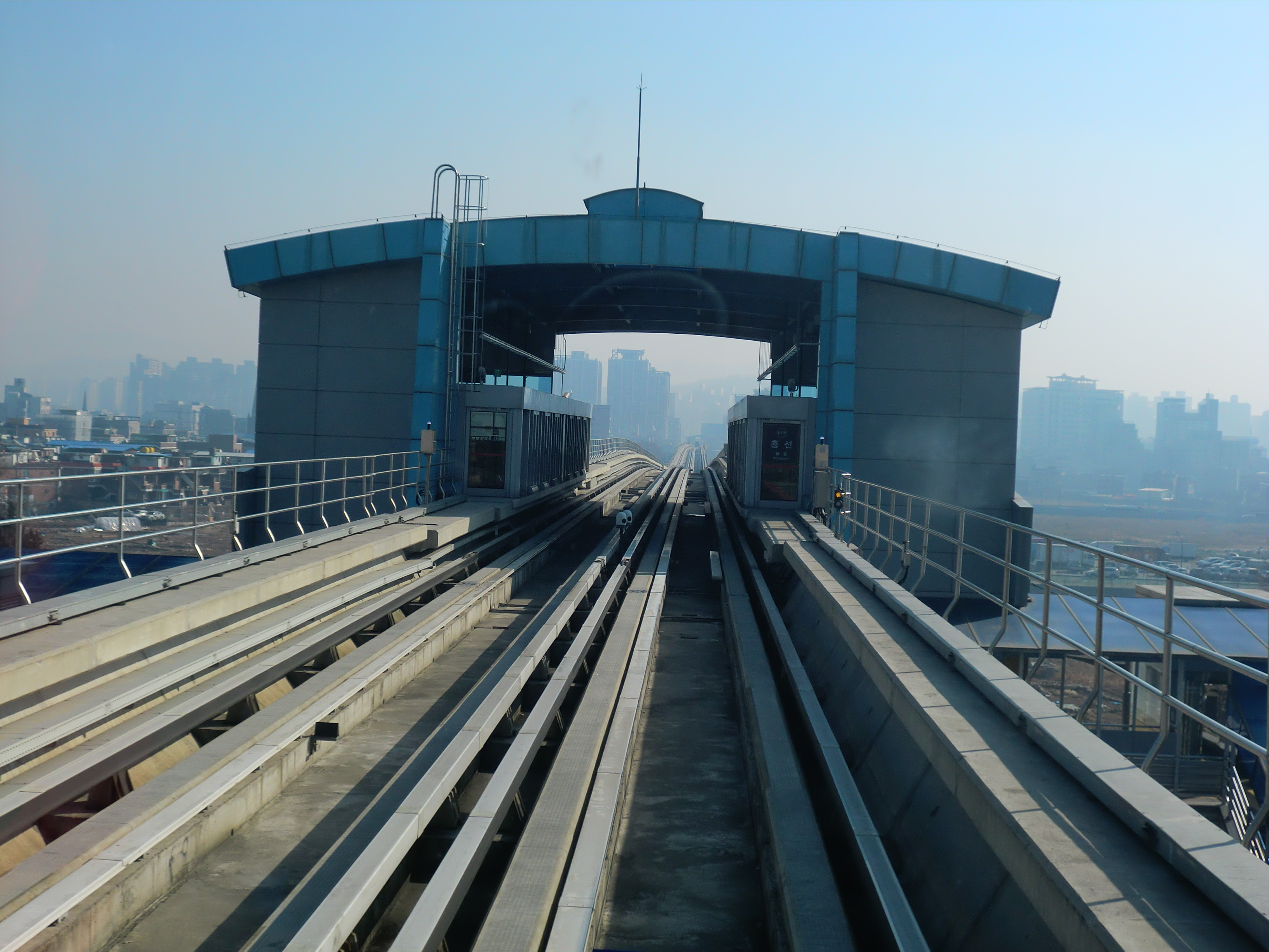 의정부경전철 흥선역